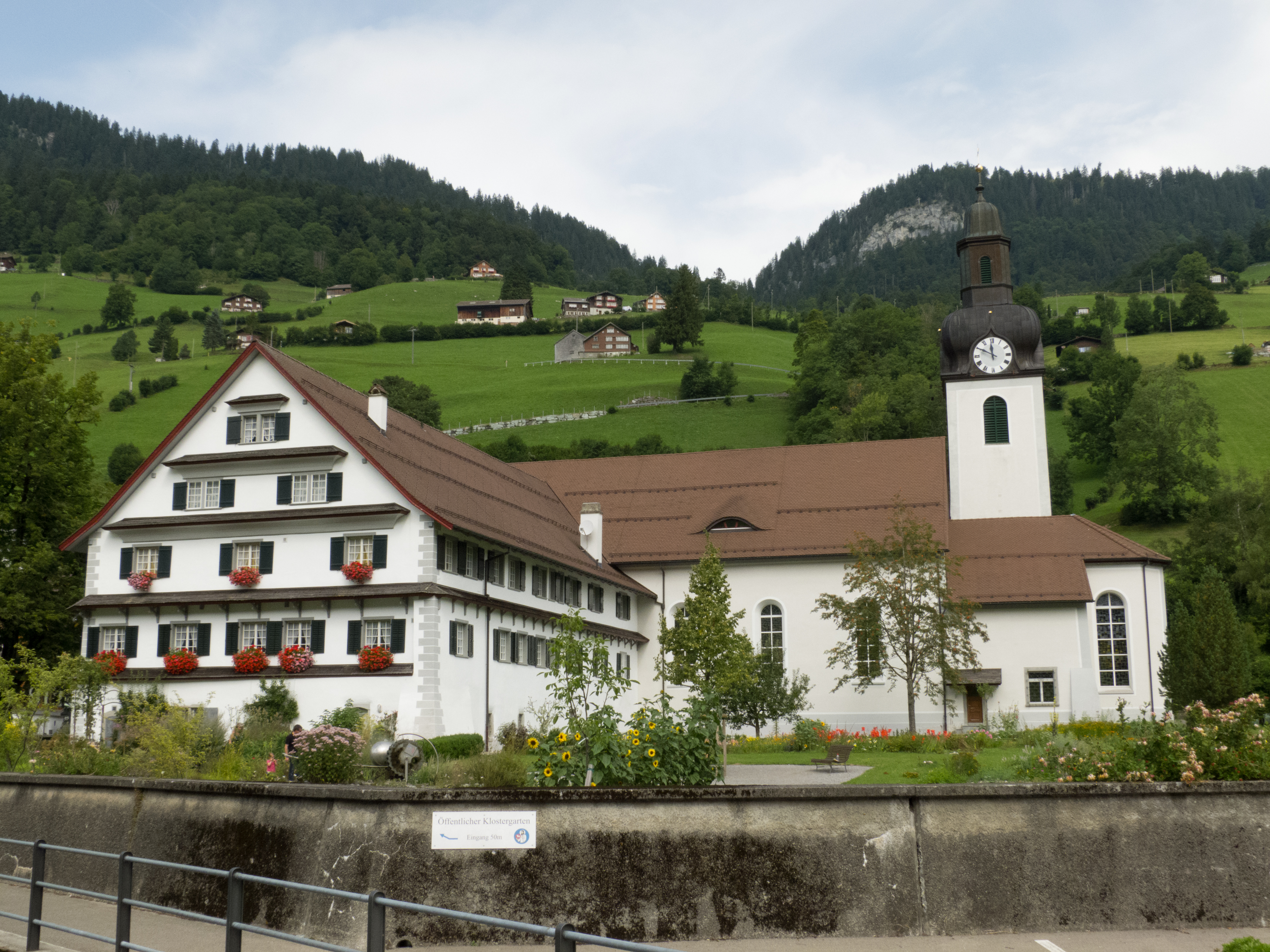 Ehemaliges Benediktinerkloster